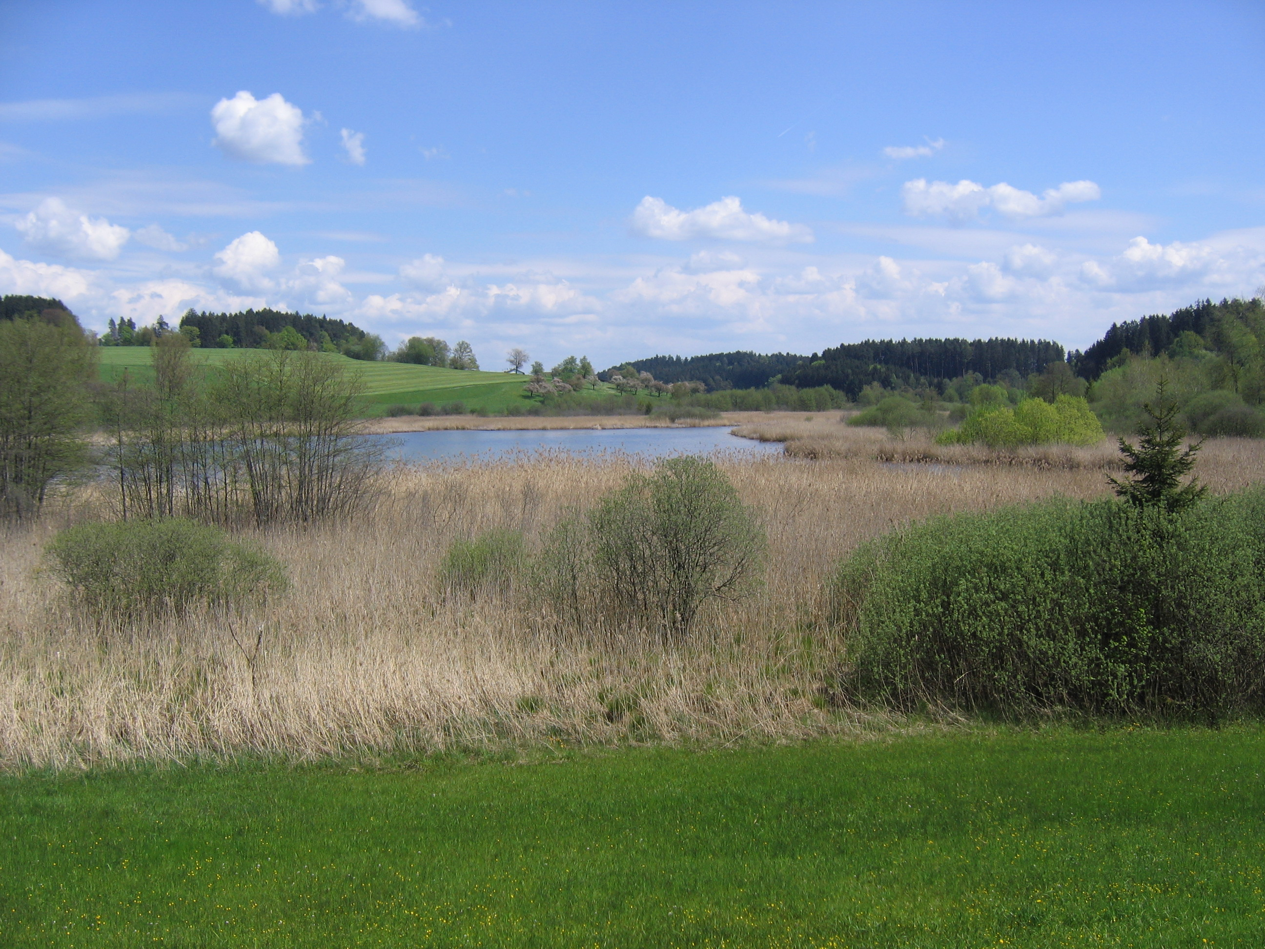 Deutschland - Baden-Württemberg - Bodenseekreis - Neukirch: Naturschutzgebiet "Kreuzweiher-Langensee"